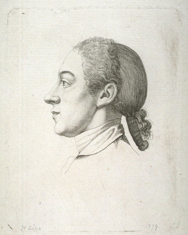 Porträtvignette: Julius Heinrich von Lindau im Profil nach links mit Haarnetz. Das Porträt entstand bei von Lindaus Aufenthalt in Zürich im Sommer 1775. Die Zuschreibung an Lips ist irrig. Technisch und in der Komposition ist es trotz fehlender Signatur Georg Friedrich Schmoll zuzuschreiben. Verkleinerte Abb. Lavater EP III S. 260 Nr. 2, durch Karin Althaus als J. H. v. Lindau identifiziert.